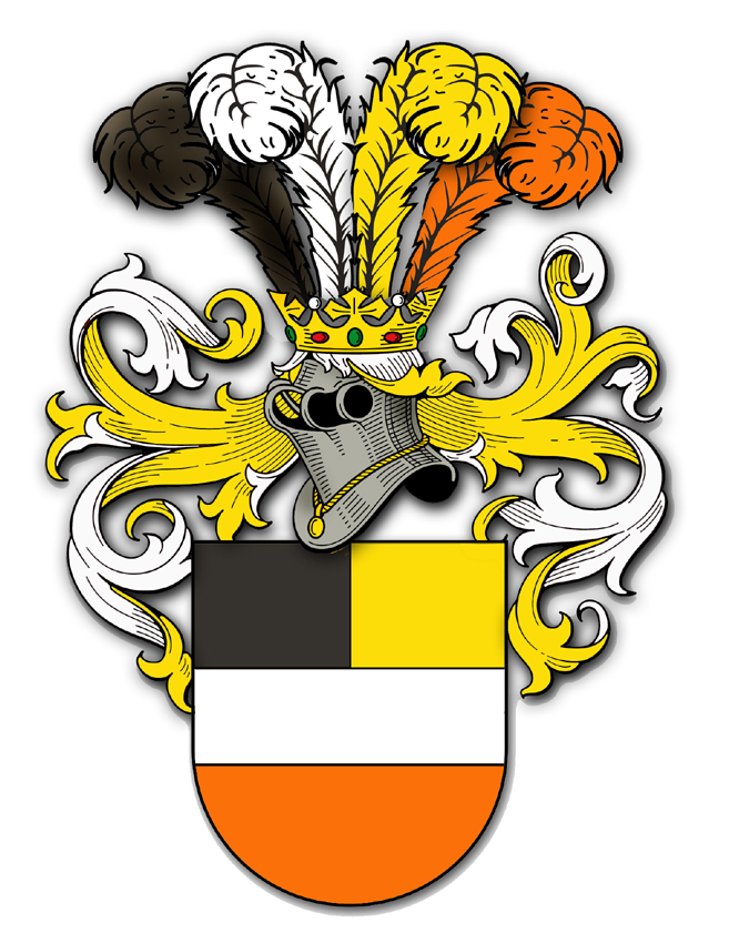 Brasão dos senhores de Girlan-Griensberg, ramo Altenburg-Leifers, do Trentino.